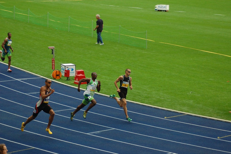 Jeremy Wariner ISTAF Berlin 2006: Derrick Brew, Marc Raquil, Gary Kikaya, Jeremy Wariner Prise en 2006 Mise en ligne le 3 septembre 2006